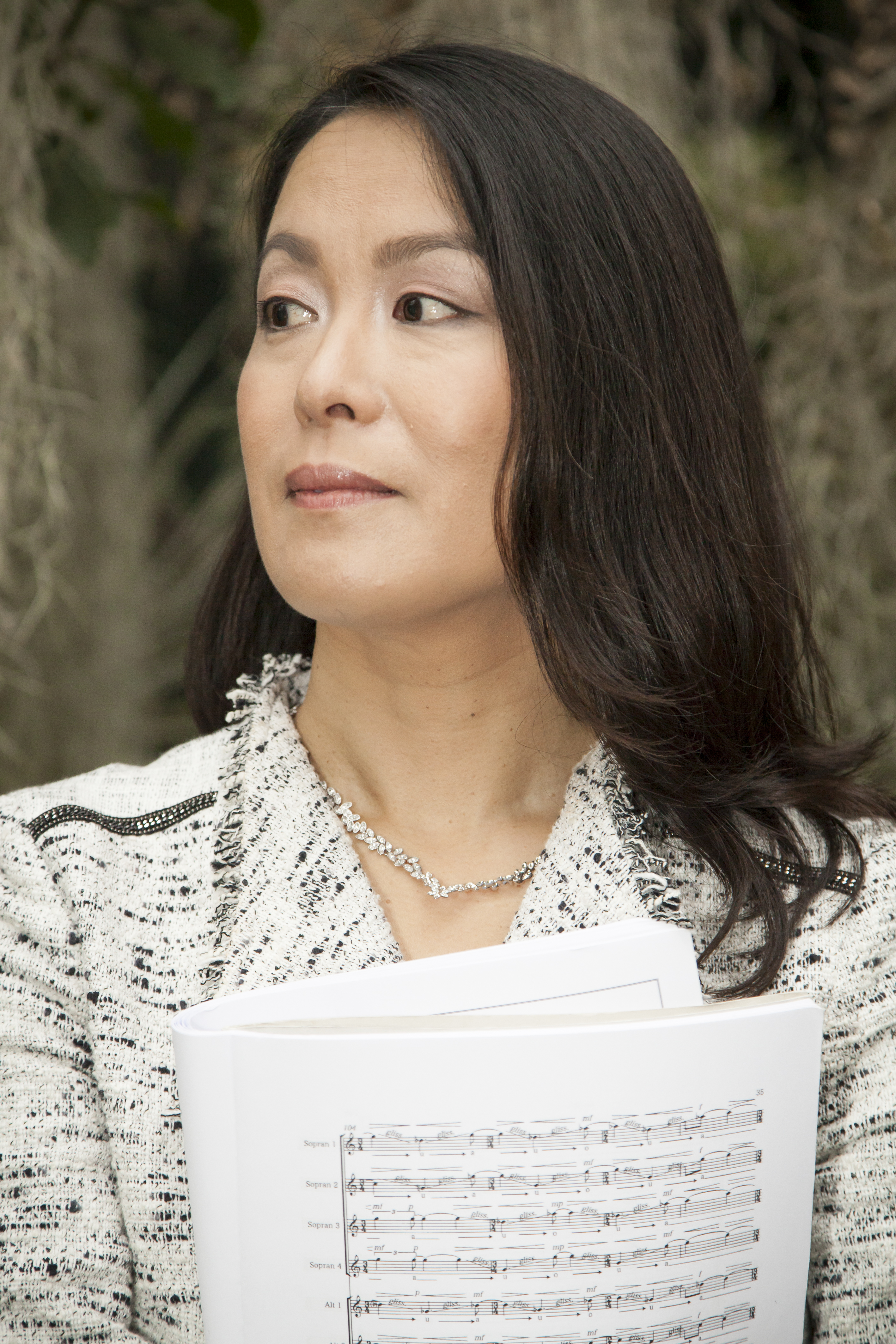 Portrait-Photographie der japanischen Komponistin Malika Kishino